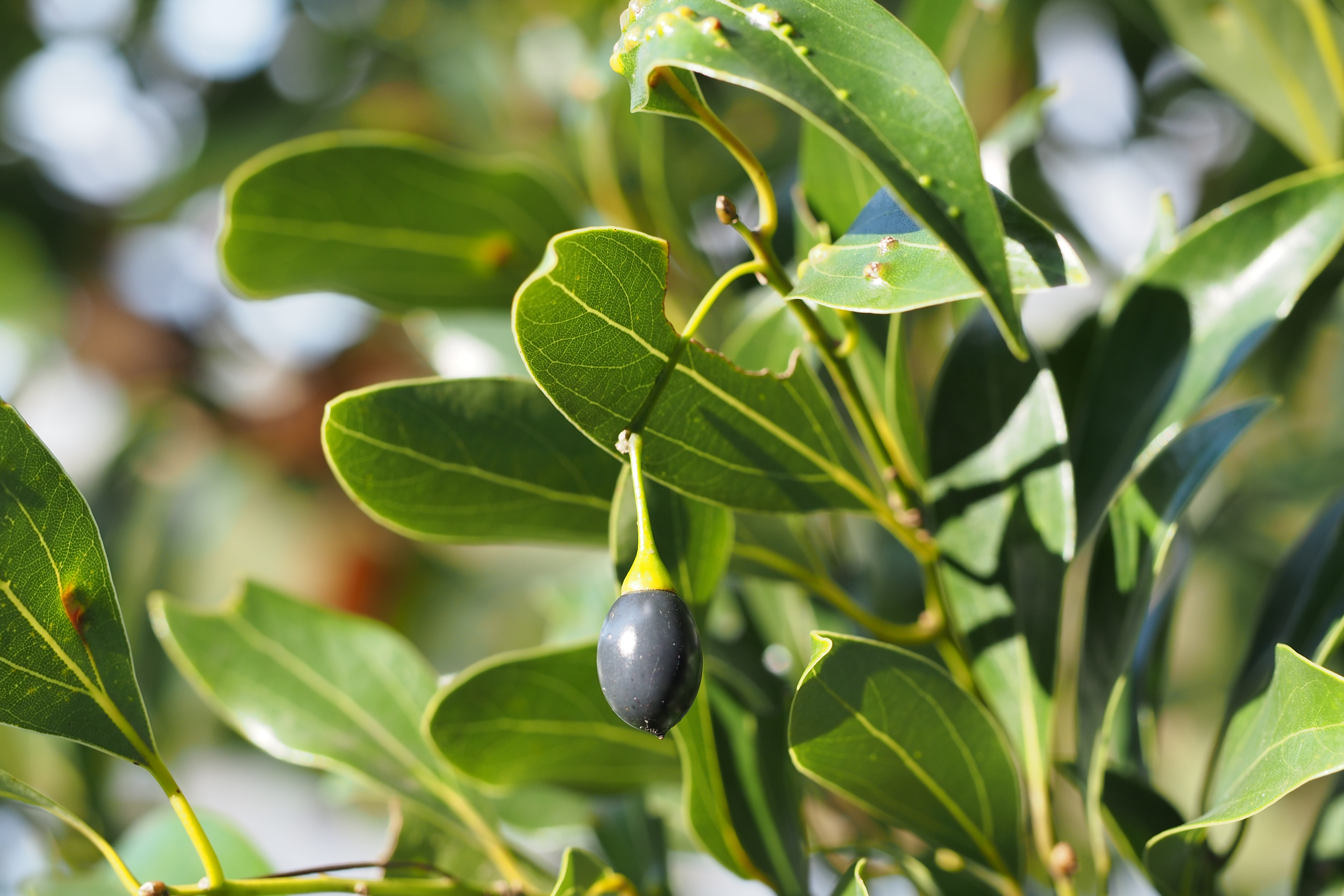 ヤブニッケイ.